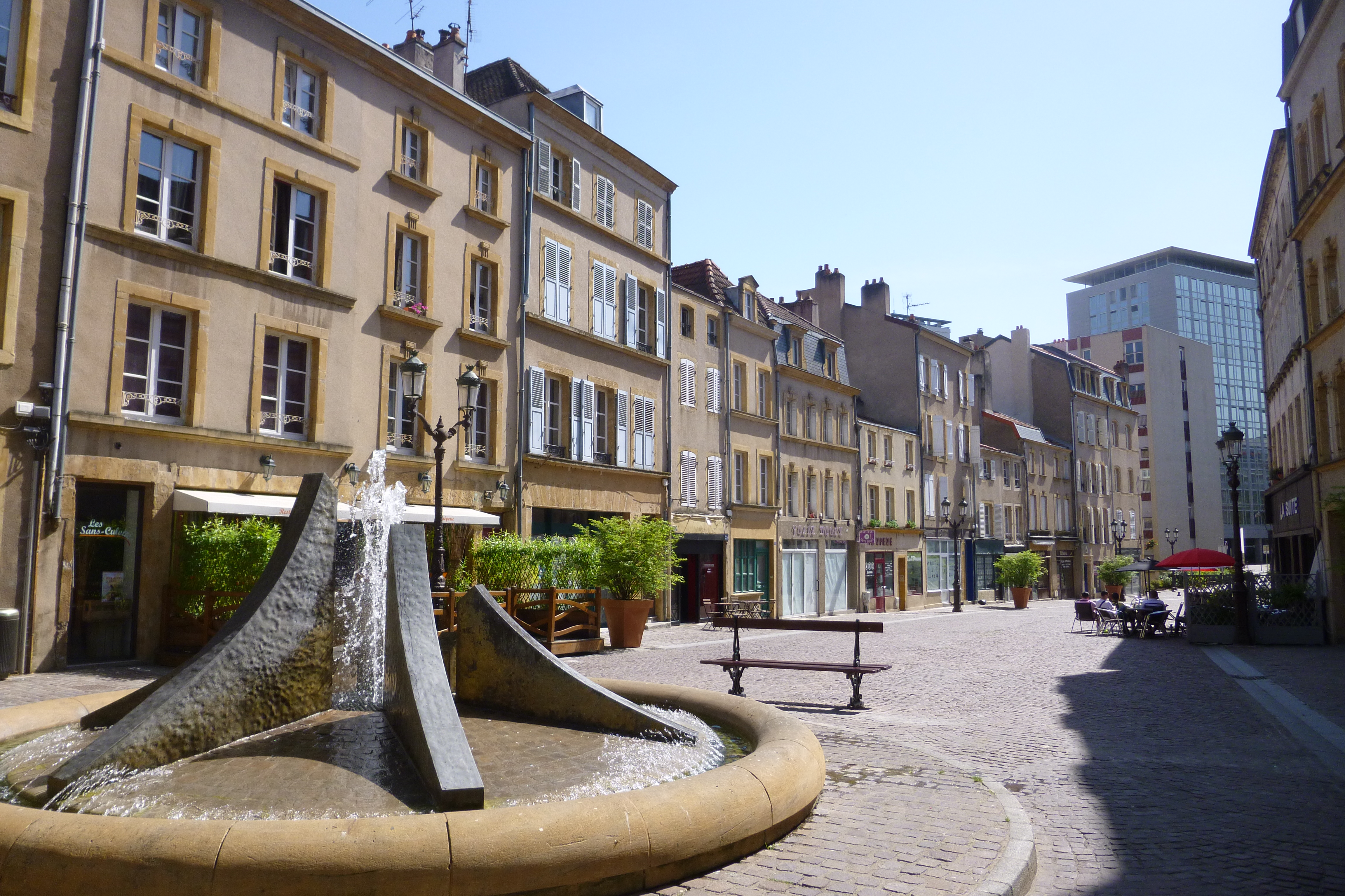 Place des Charrons, Outre-Seille, vieille ville de Metz (Lorraine)